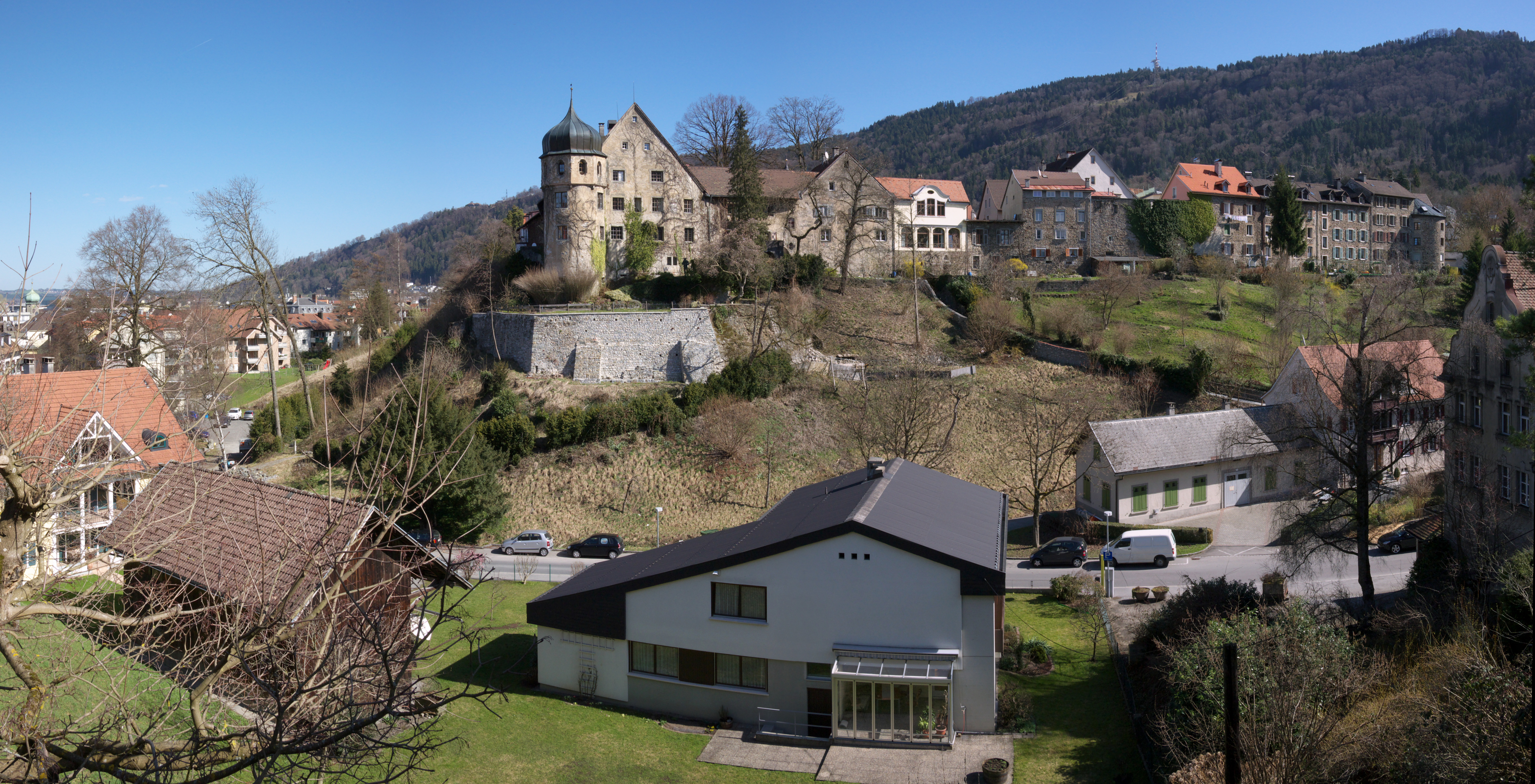 Panorama Oberstadt in Bregenz mit Gourmethotel Deuringschlössle Dieses Bild wurde anlässlich des österreichischen Tags des Denkmals 2013 in Vorarlberg eingereicht.